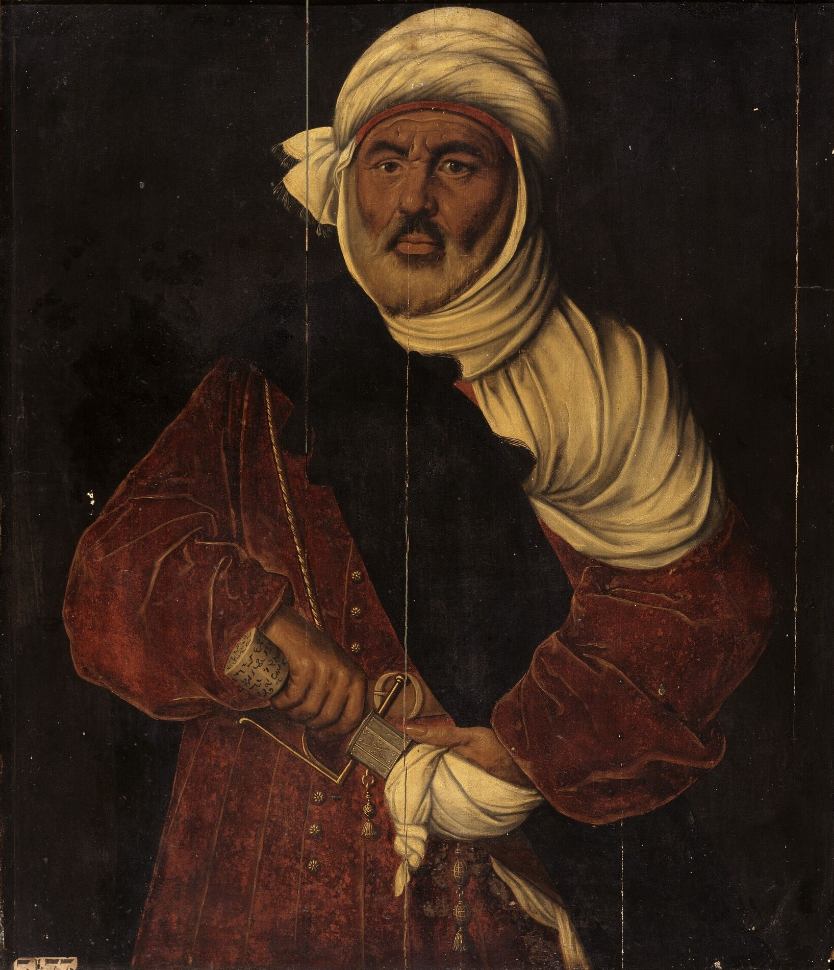 Moulay Hassan, souverain hafside de Tunis